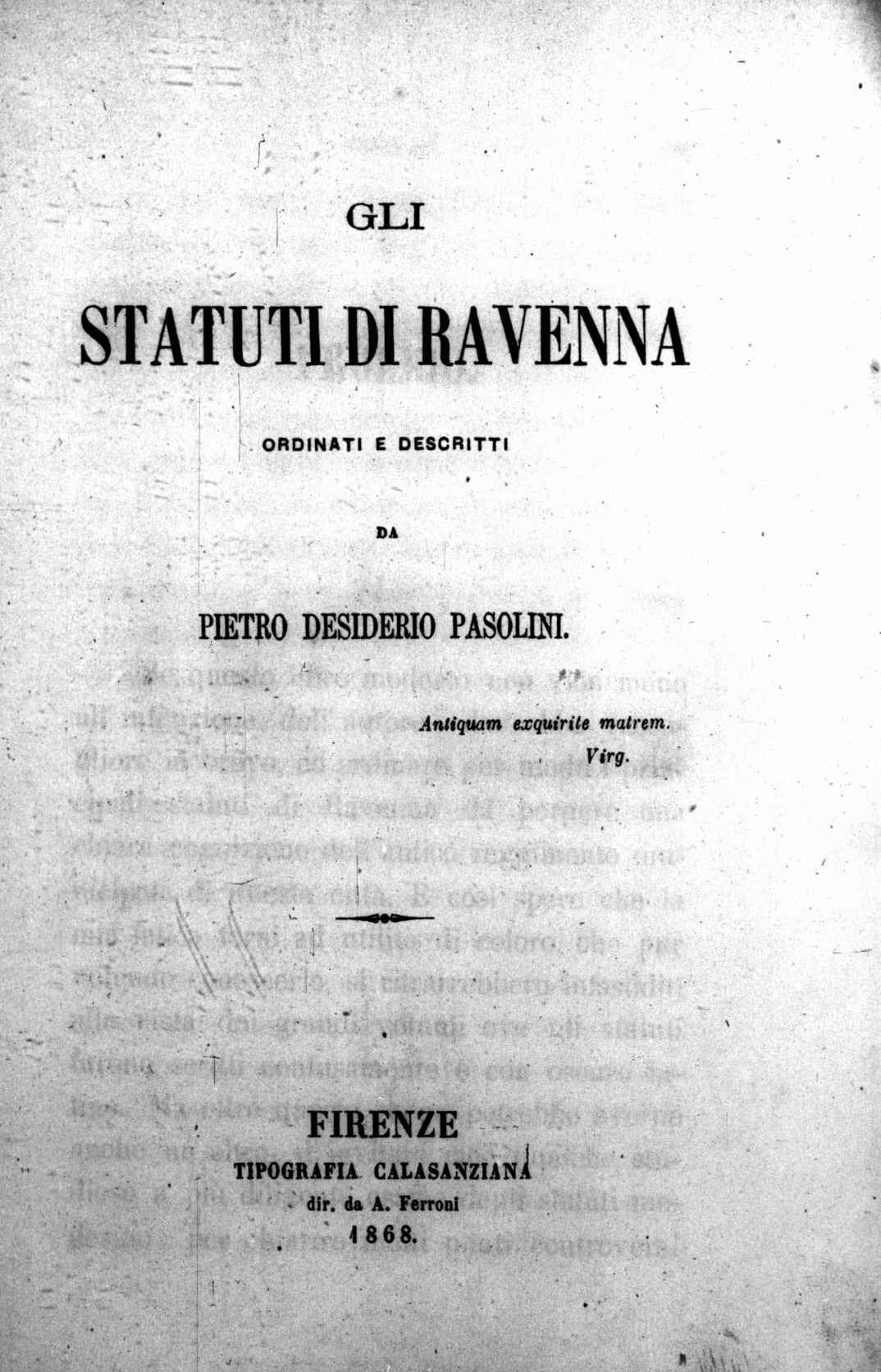 Frontespizio